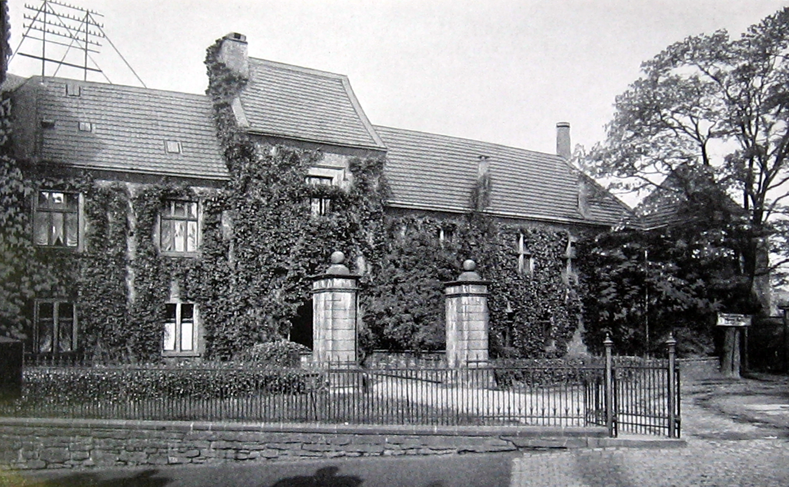 Haus Witten 1909, Ostansicht